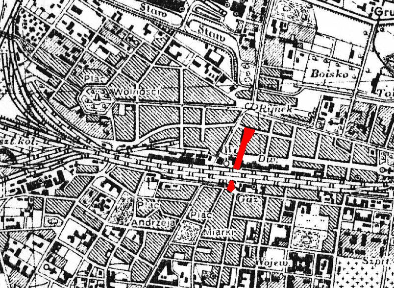 Mapa ulicy św. Jana w Katowicach (zaznaczona czerwoną linią) na fragmencie mapy Wojskowego Instytutu Geograficznego w Warszawie z roku 1933 (PAS 47 - SŁUP 28 - H)